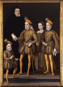 portrait de Catherine de Médicis et de quatre de ses enfants (de gauche à droite) : Henri III, Charles IX, Marguerite de France, François II.